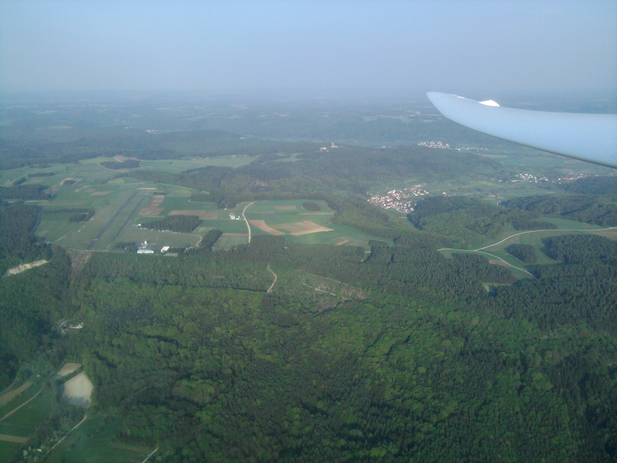 Luftbild Lange Meile , Flugplatz Burg Feuerstein von Westen